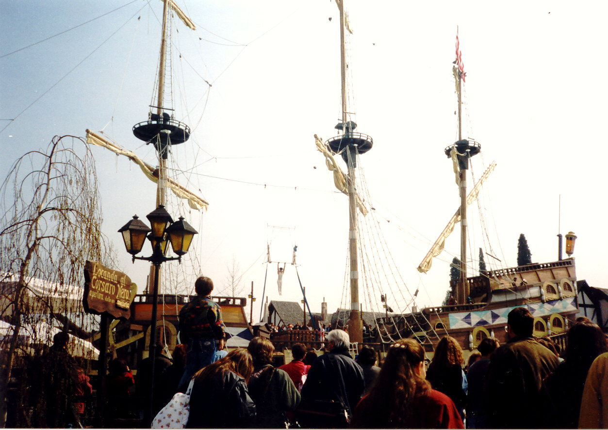 Spettacolo nel villaggio inglese di Gardaland